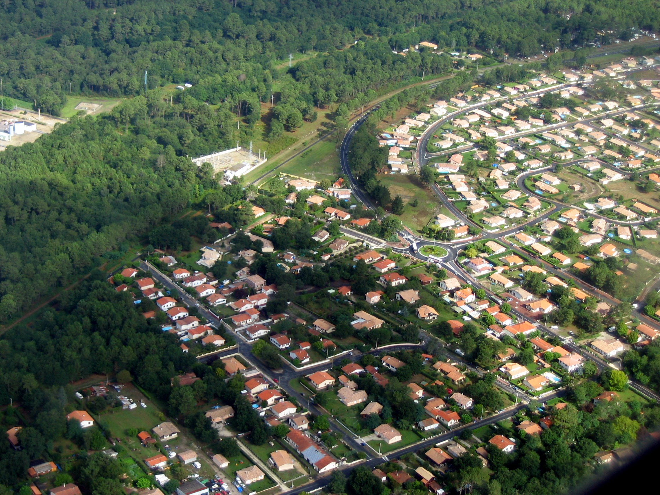 Vue aérienne de Cazaux (La Teste de Buch, Gironde, Aquitaine, France)